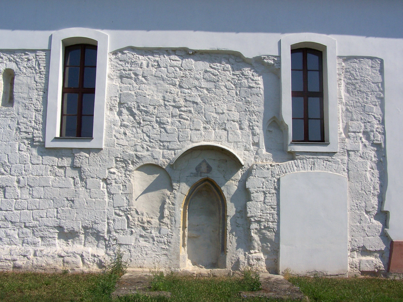 Római katolikus templom (Szent György) (Jobbágyi, Felszabadulás út 60.) This is a photo of a monument in Hungary. Identifier: 6662